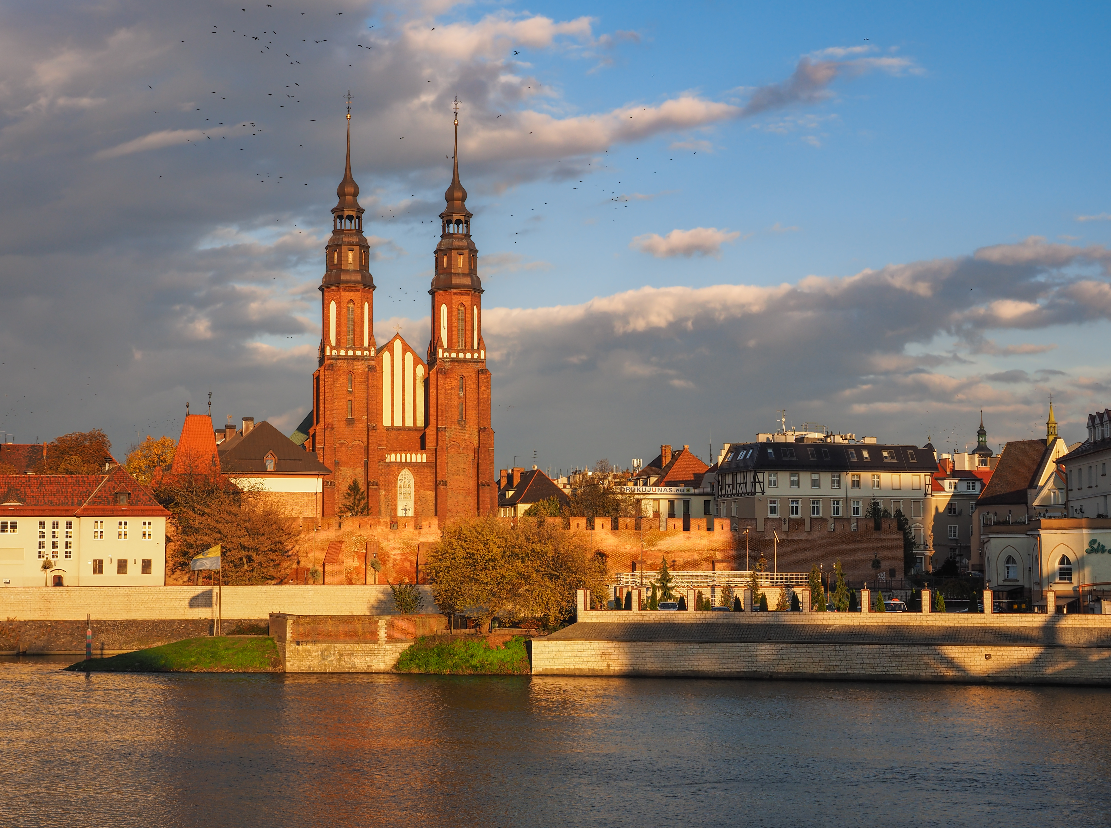 Opole, Bazylika katedralna Podwyższenia Krzyża Świętego w Opolu - numer rejestru: 627786 149/55 z 19.01.1955